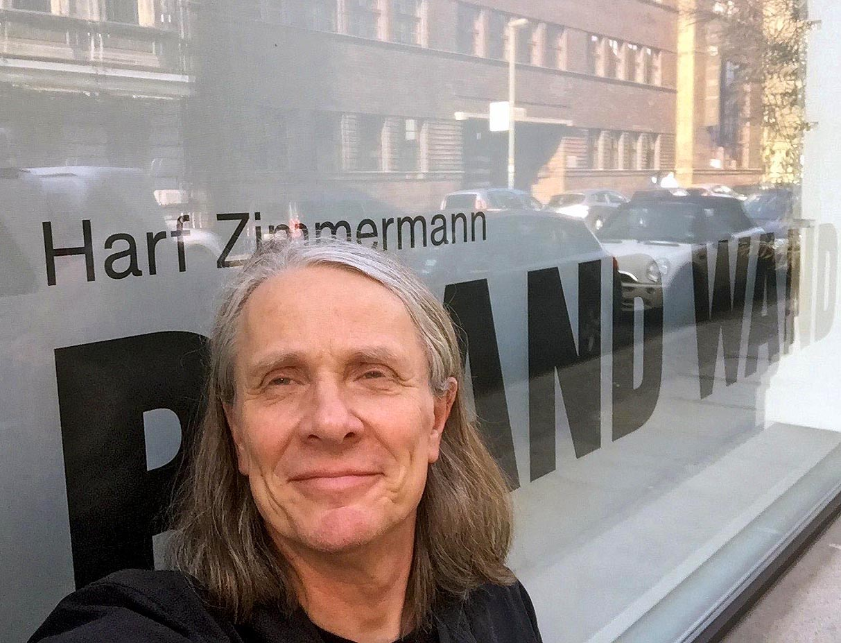 Harf Zimmermann (Fotograf)